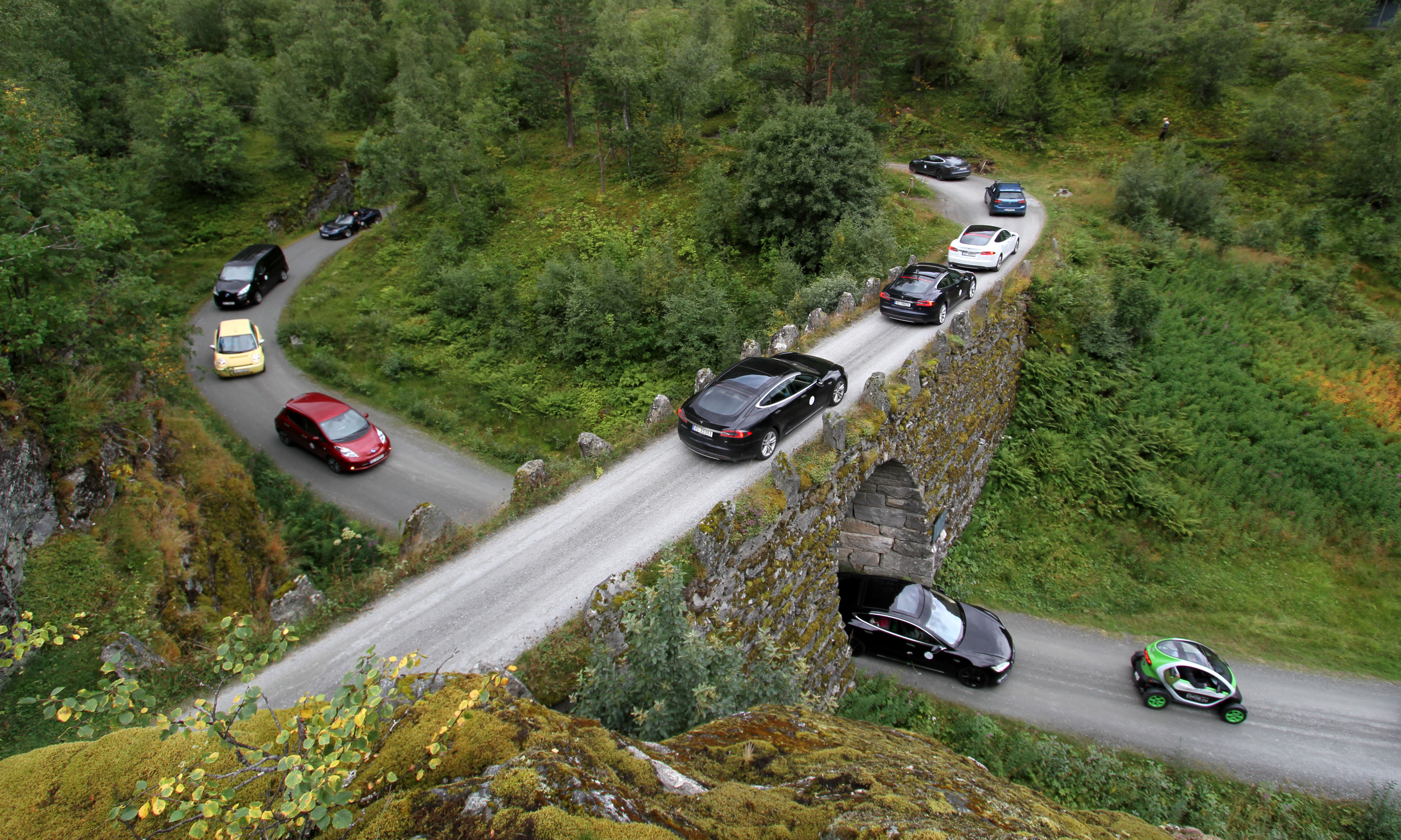 Elbilfestival i Geiranger / EV Festival in Geiranger #erallygeiranger (Photo credit: Ståle Frydenlund/elbil.no)